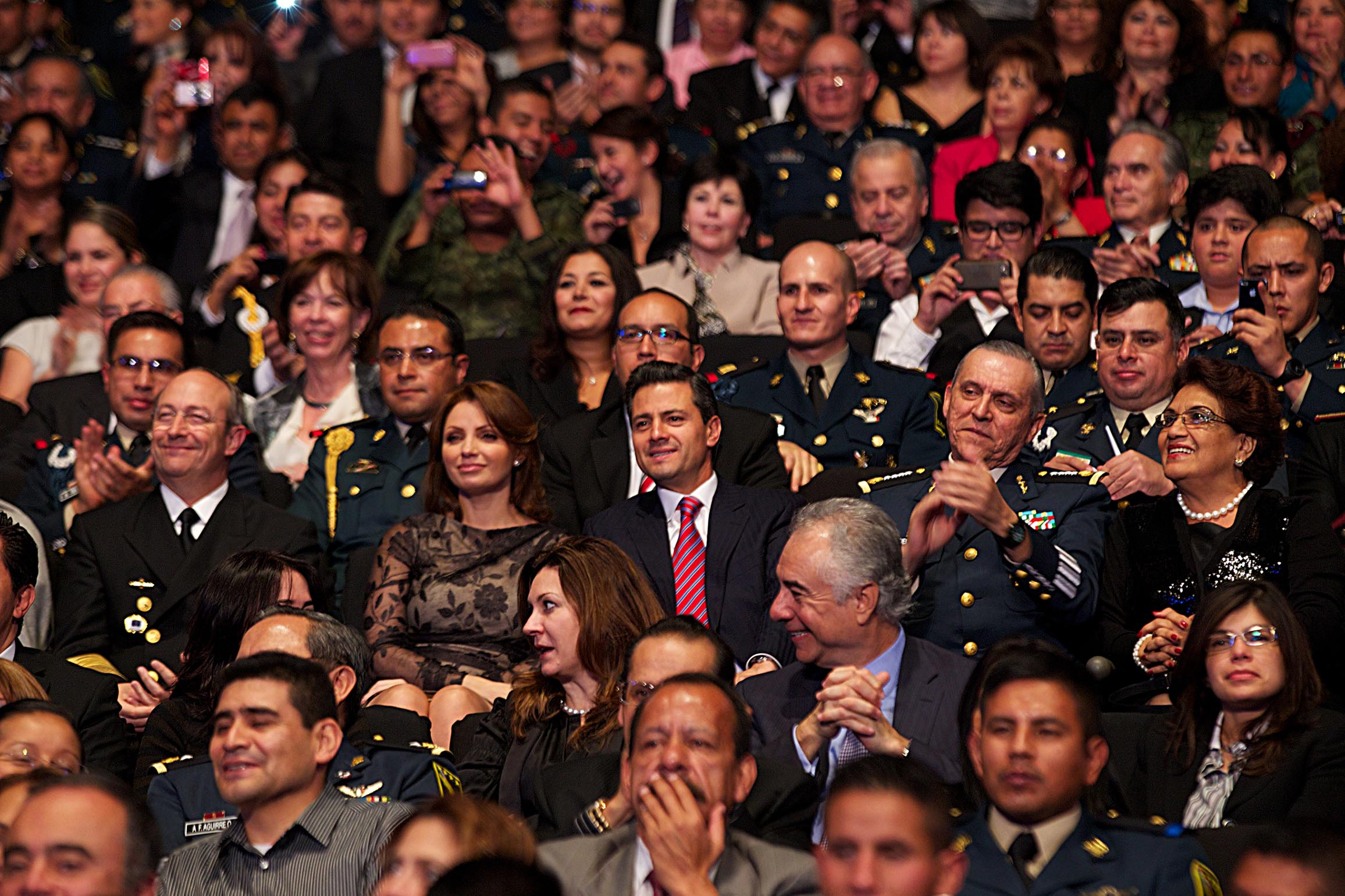 Concierto musical de las Orquestas Sinfónica del Ejército y Fuerza Aérea y Filarmónica de la Armada de México. Ciudad de México. 18 febrero 2013